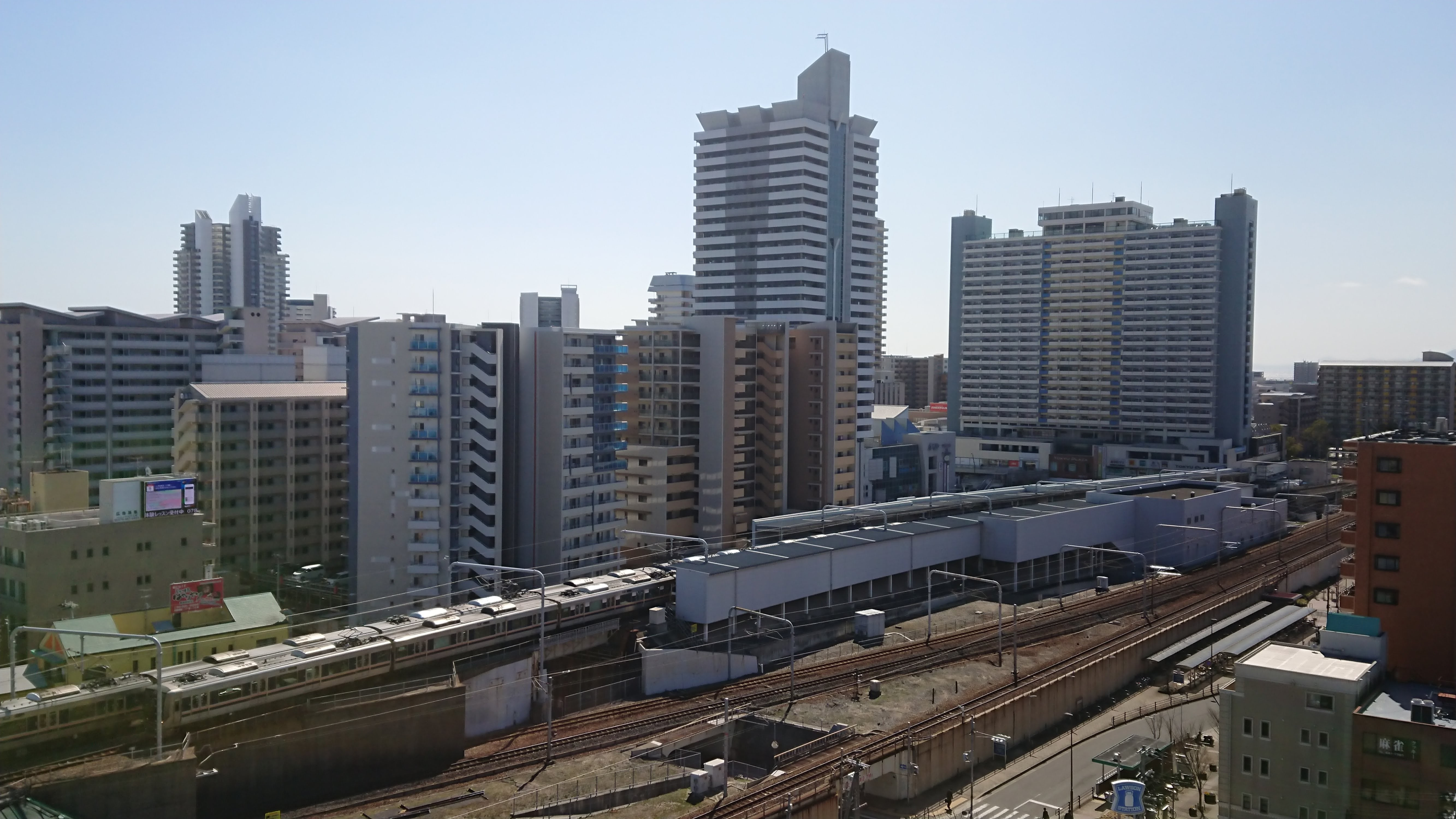 新長田駅を北側より望む。駅南再開発地区を望む。